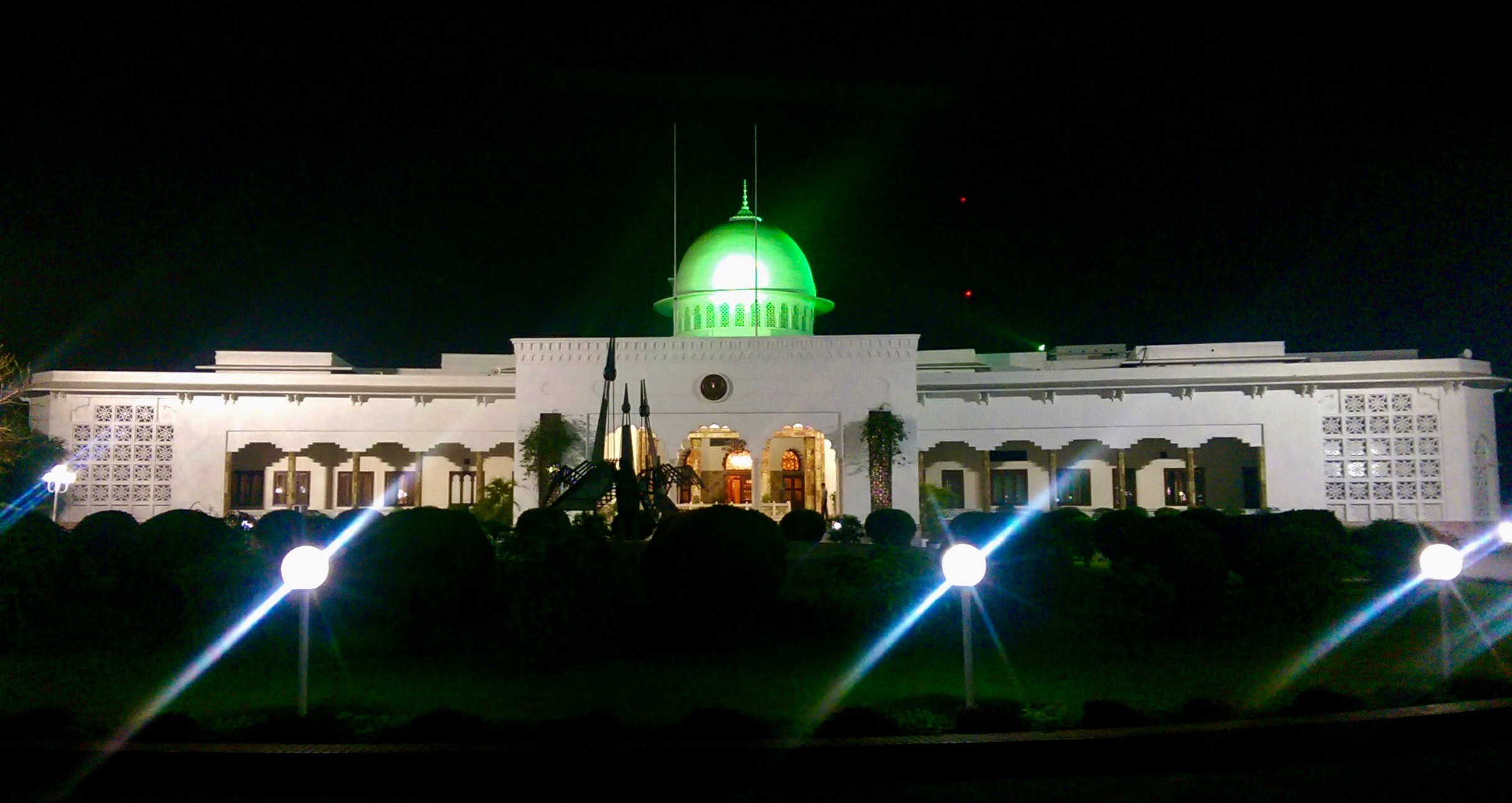 বঙ্গভবন, গণপ্রজাতন্ত্রী বাংলাদেশ সরকারের মহামান্য রাস্ট্রপতির বাসভবন।